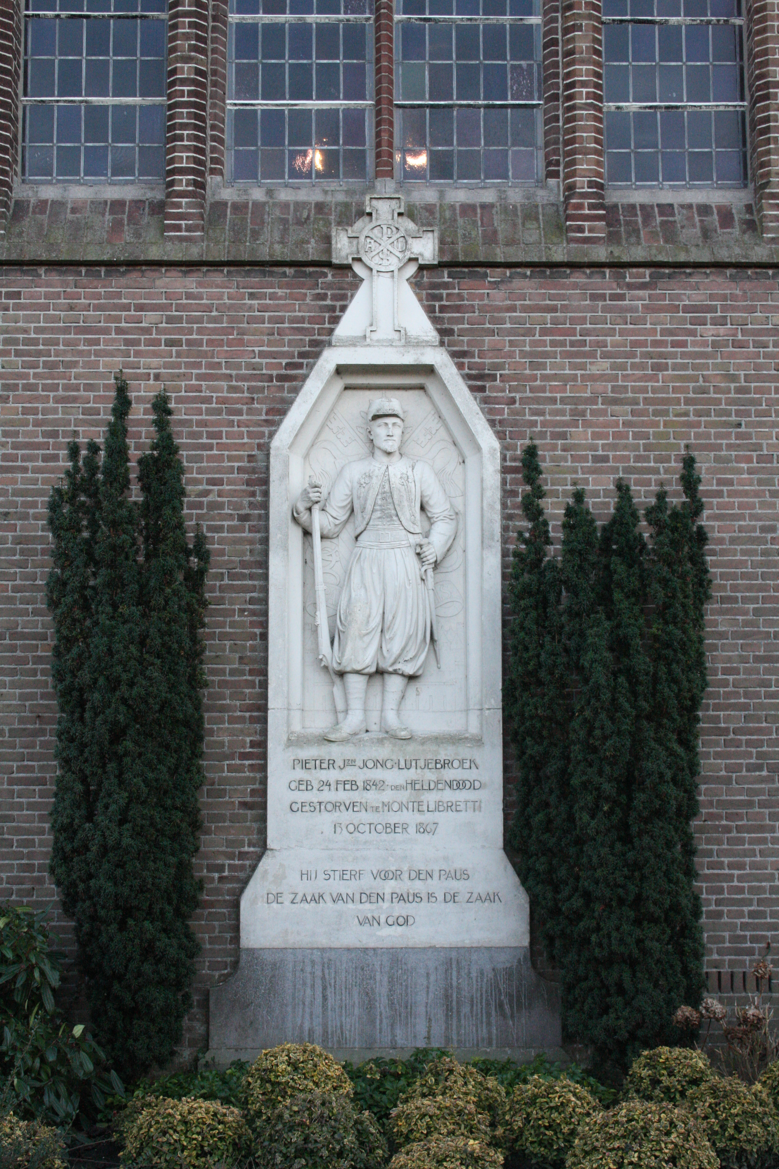 Herinneringsmonument voor Pieter Jzn Jong uit Lutjebroek. Geboren 24 februari 1842, gestorven 13 oktober 1867 te Mont Libretti.